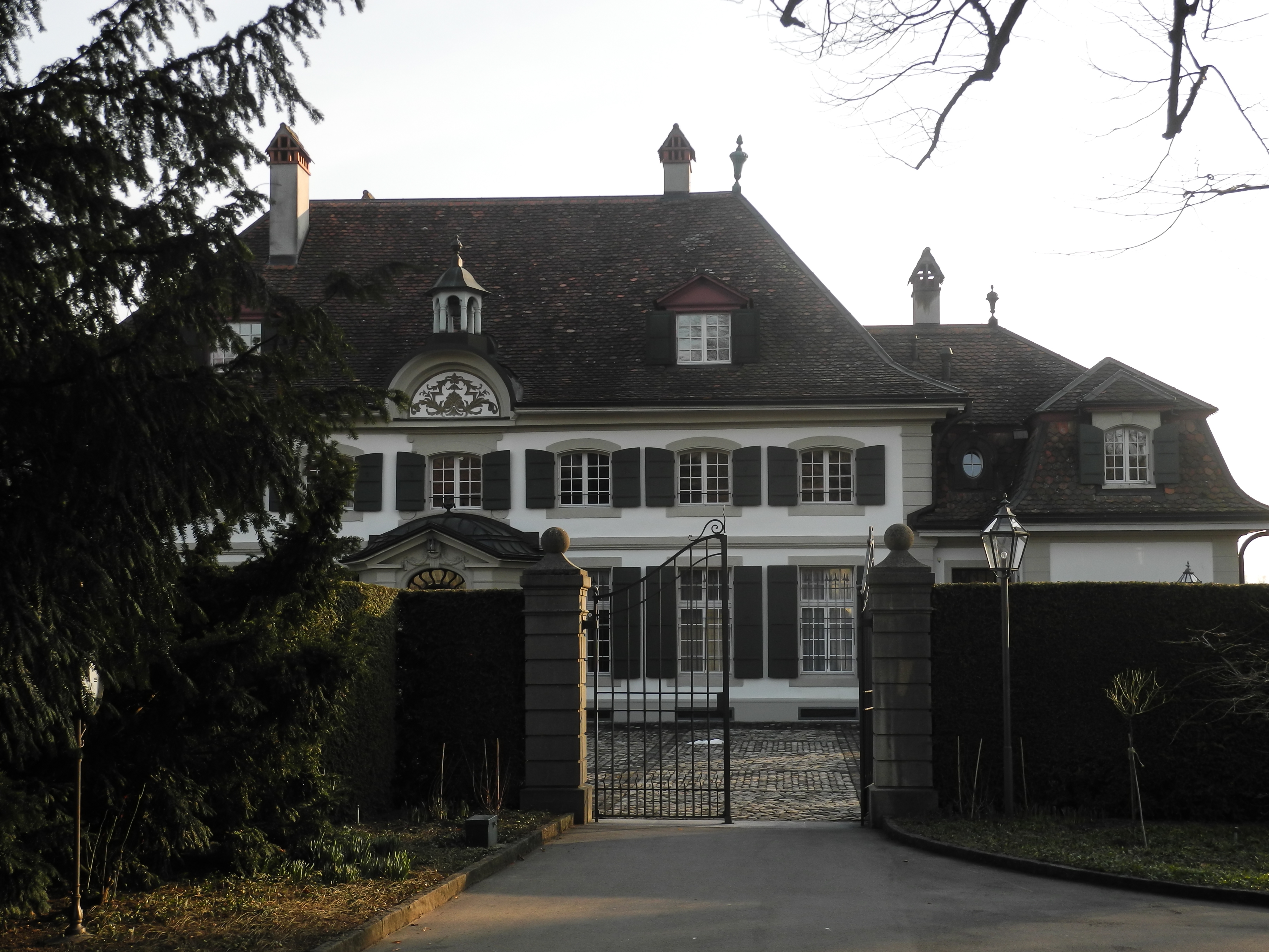 Das neue Schloss Worb aus dem 18. Jahrhundert ist neben dem älteren Schloss Worb das zweite Schloss am Ort.